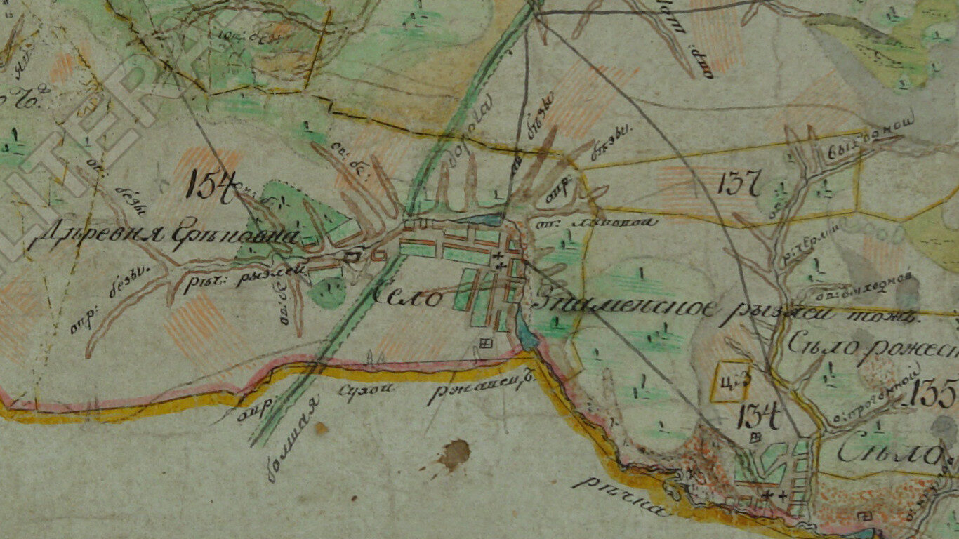 Село Знаменское (Рызлей тожъ) на двухверстной карте Сызранского уезда Симбирской губернии 1806 г.